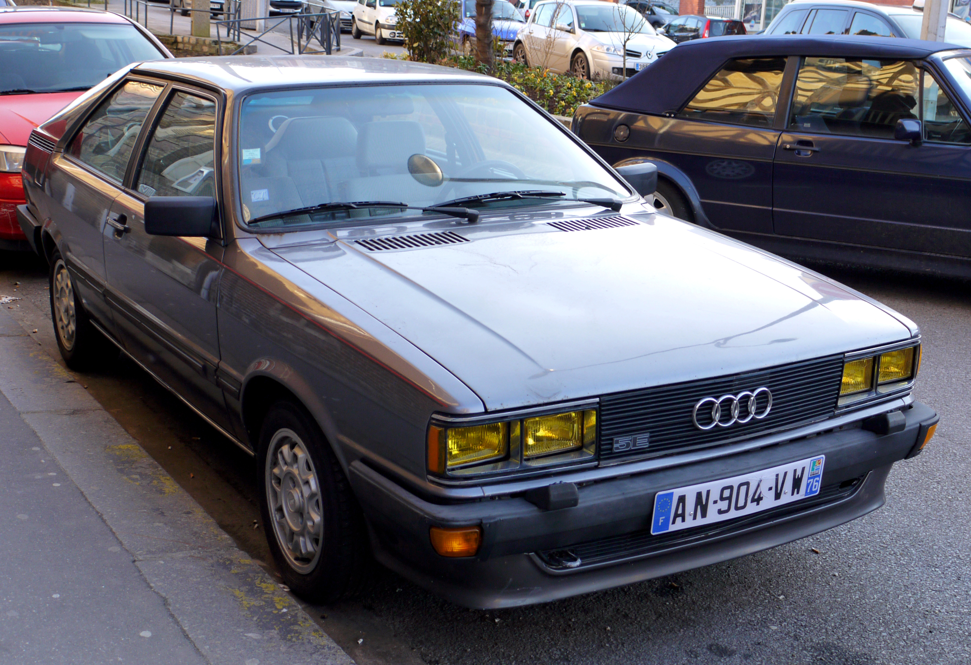 Audi Coupé GT 5E Mk I.